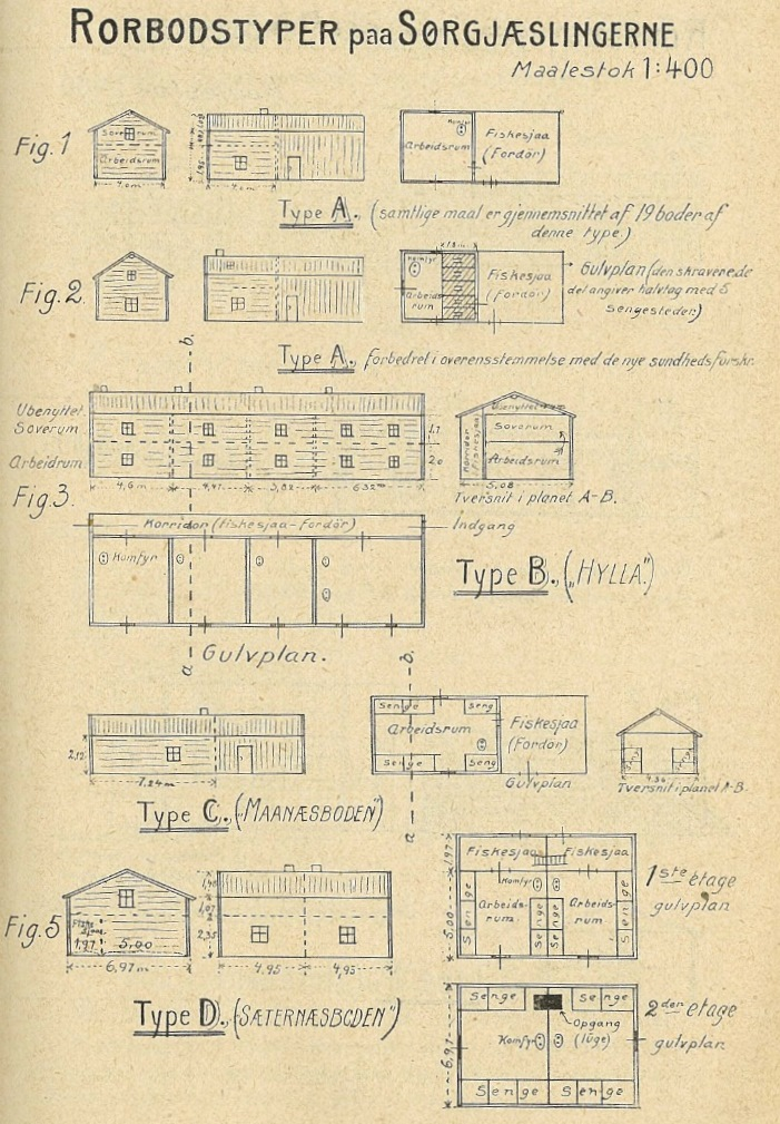 types of rorbu in Sør-Gjæslingan, Vikna, Norway. Drawings by district physician Harald Natvig